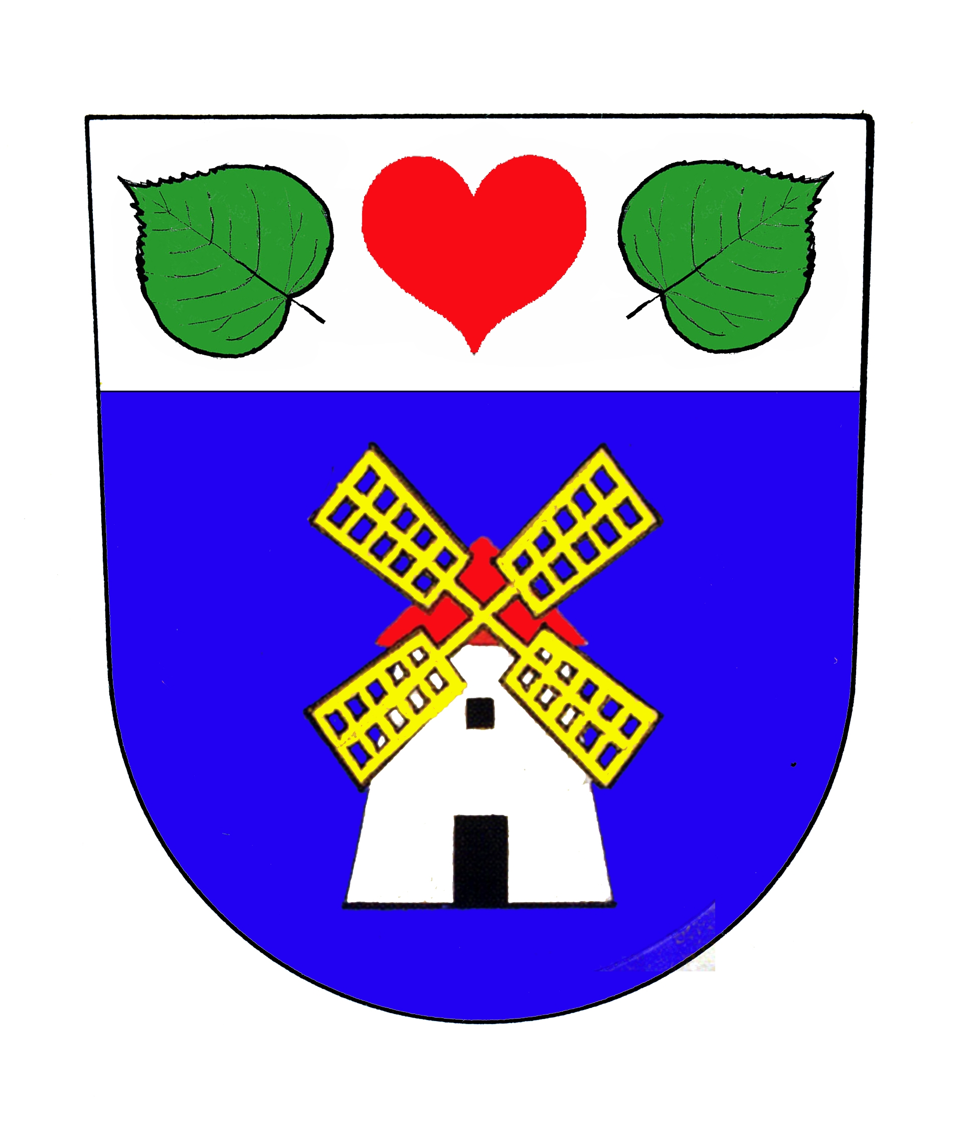 Česky: znak obce Police